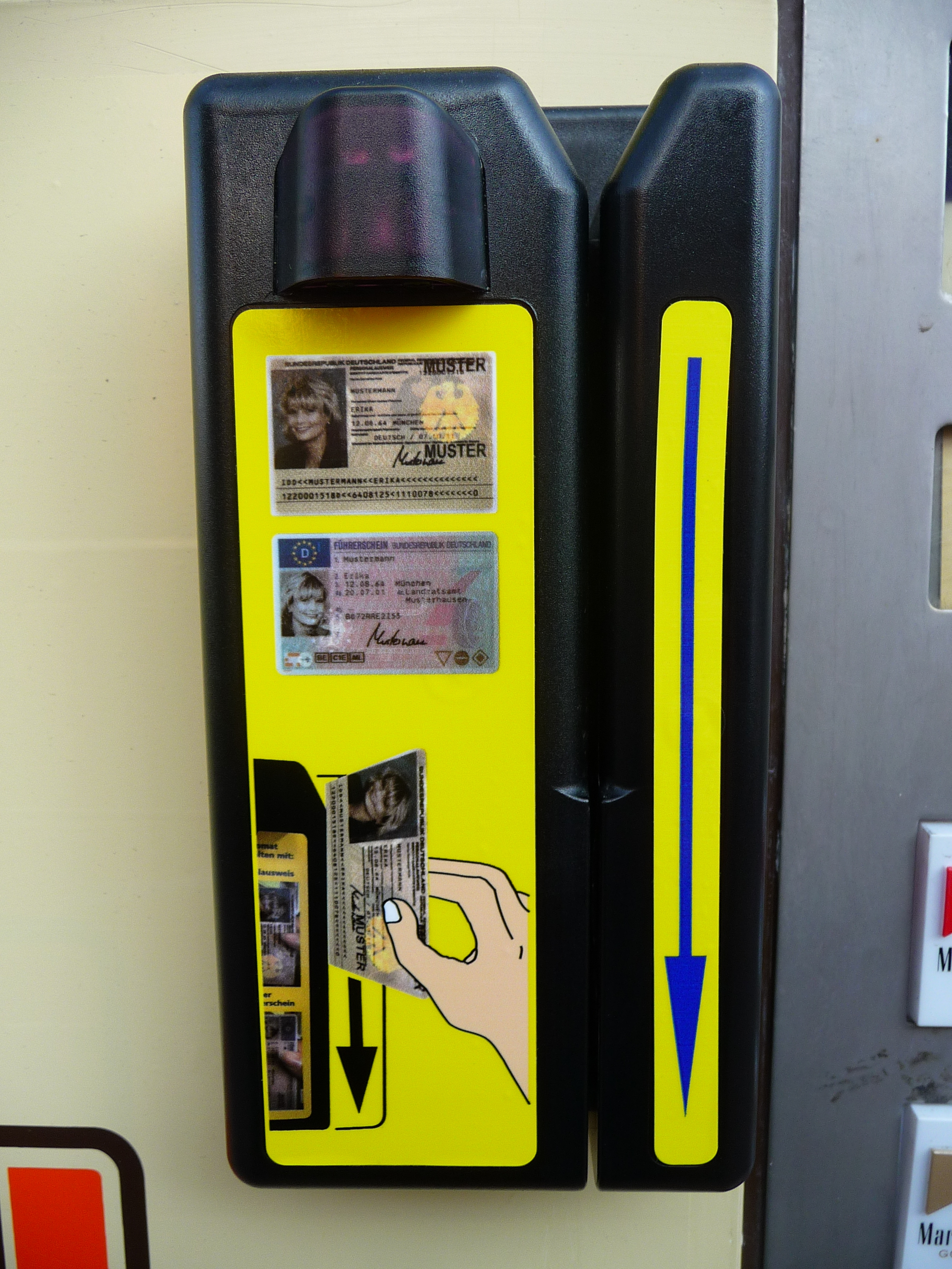 Vorrichtung zum Freischalten eines Zigarettenautomaten mittels Personalausweis